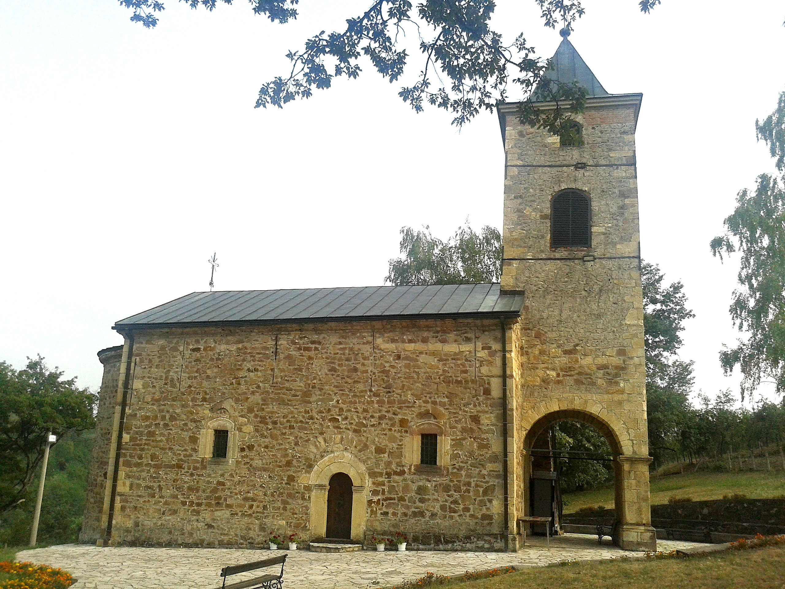 Црква Светог Николе у Брусници